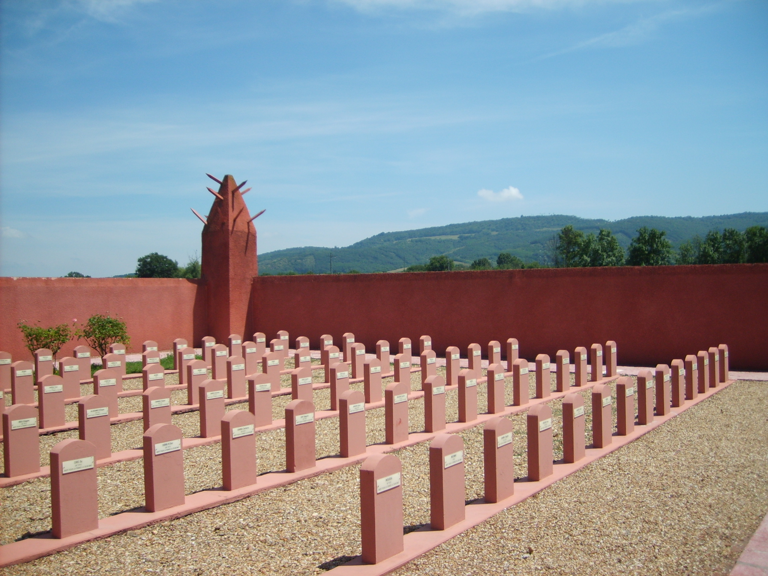 Le Tata sénégalais de Chasselay (nécropole militaire, vue intérieure) à Chasselay (Rhône).